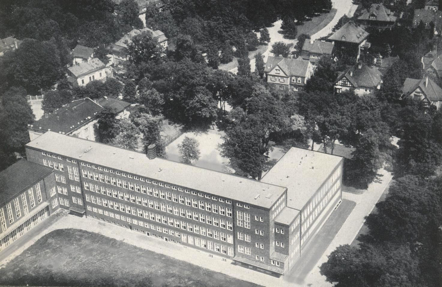 Zdjęcie lotnicze kompleksu gimnazjum Marii Magdaleny we Wrocławiu.